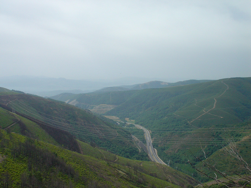 Vista panorámica en El Bierzo (provincia de León) en el recorrido del Camino de Santiago